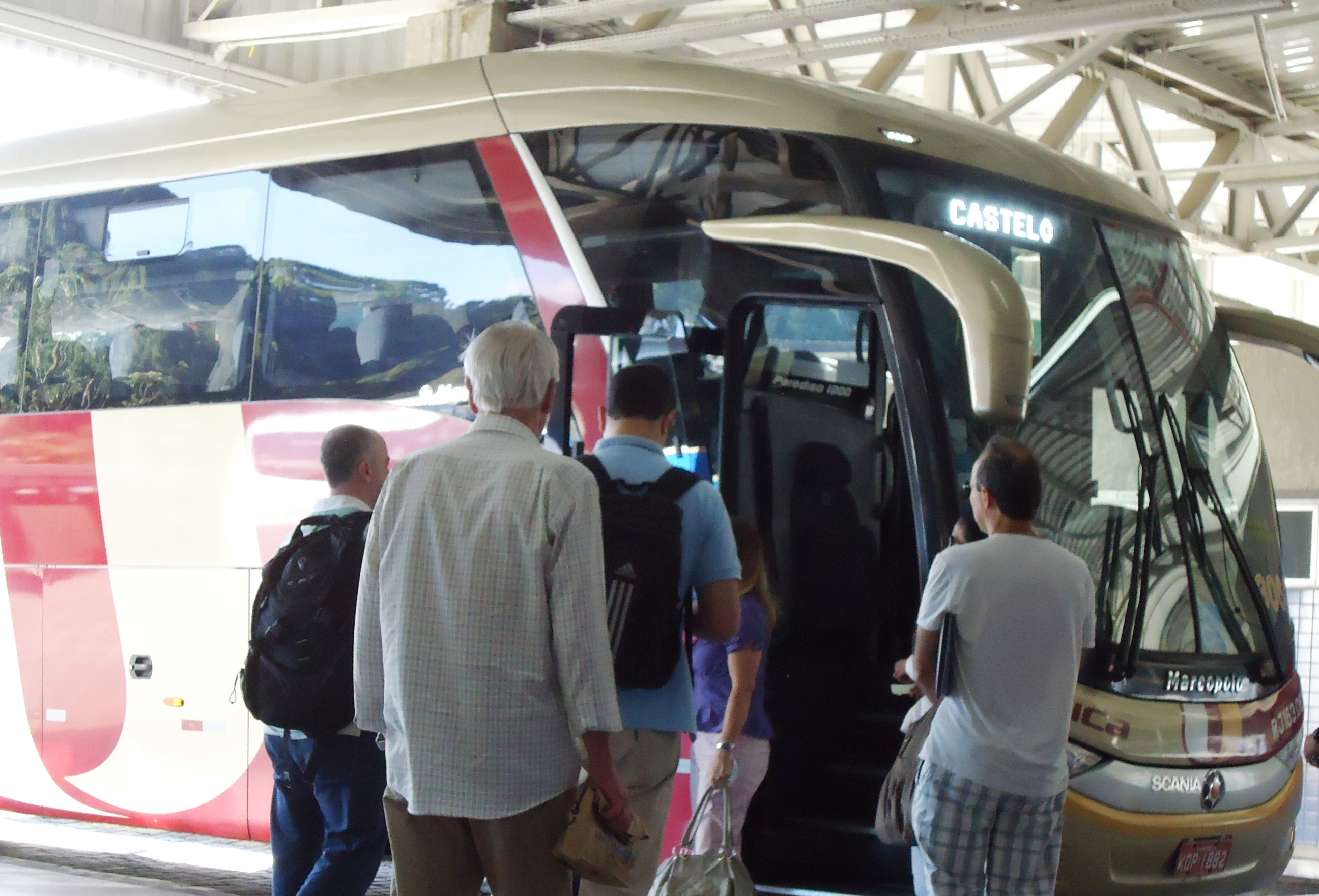 Ônibus Itaipava -Castelo Transportes Única Petrópolis